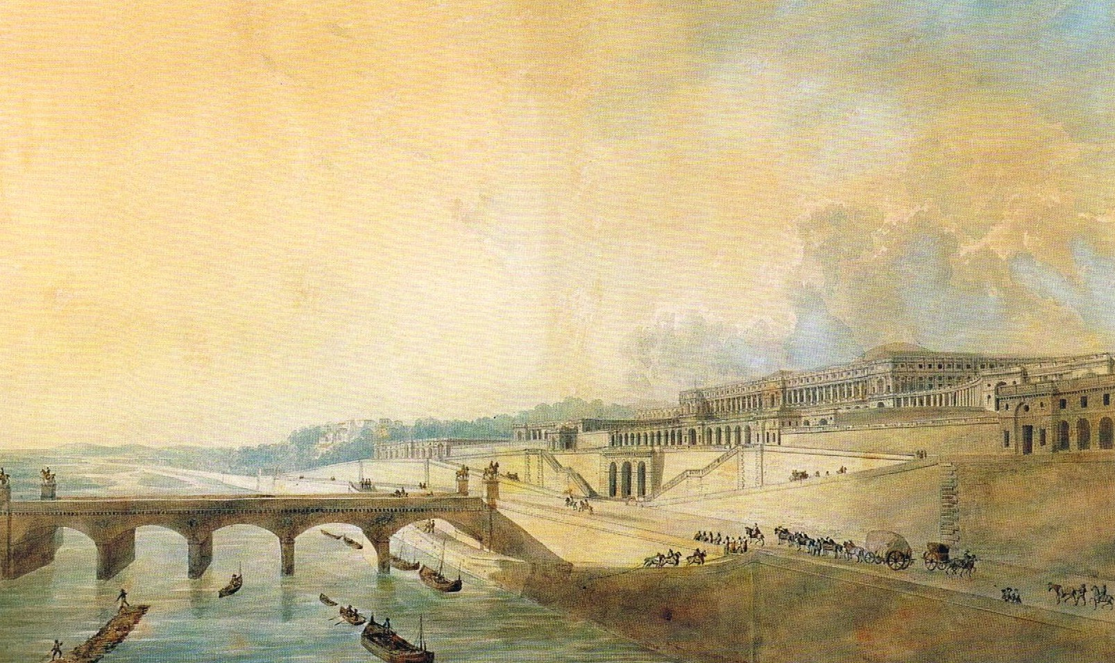 Vue du palais impérial de Chaillot appelé palais du roi de Rome.